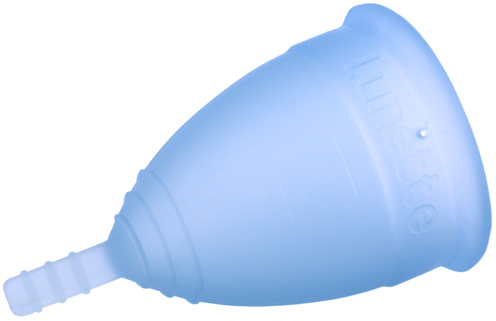 менструальная чаша Лунетт